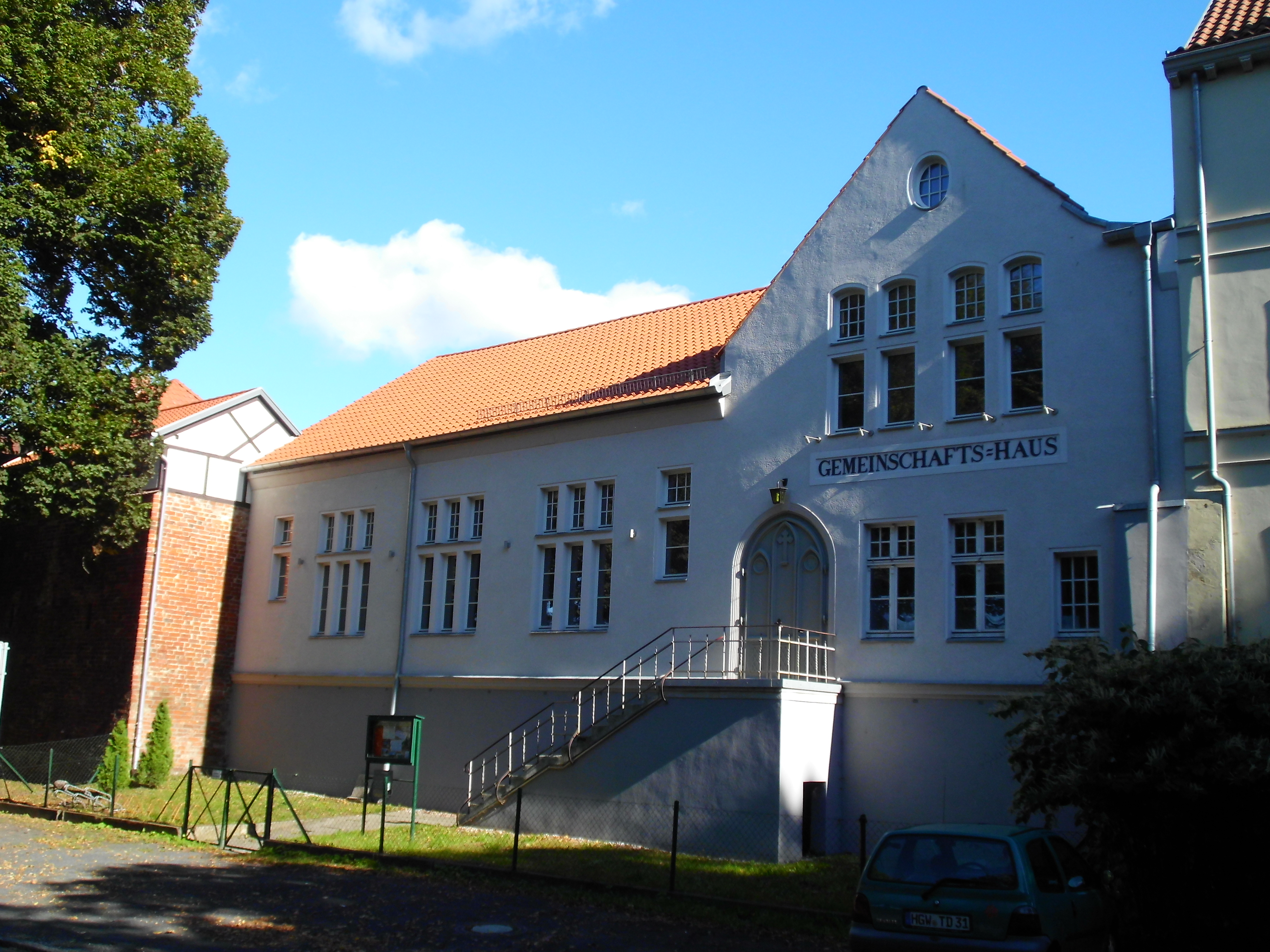 saniert